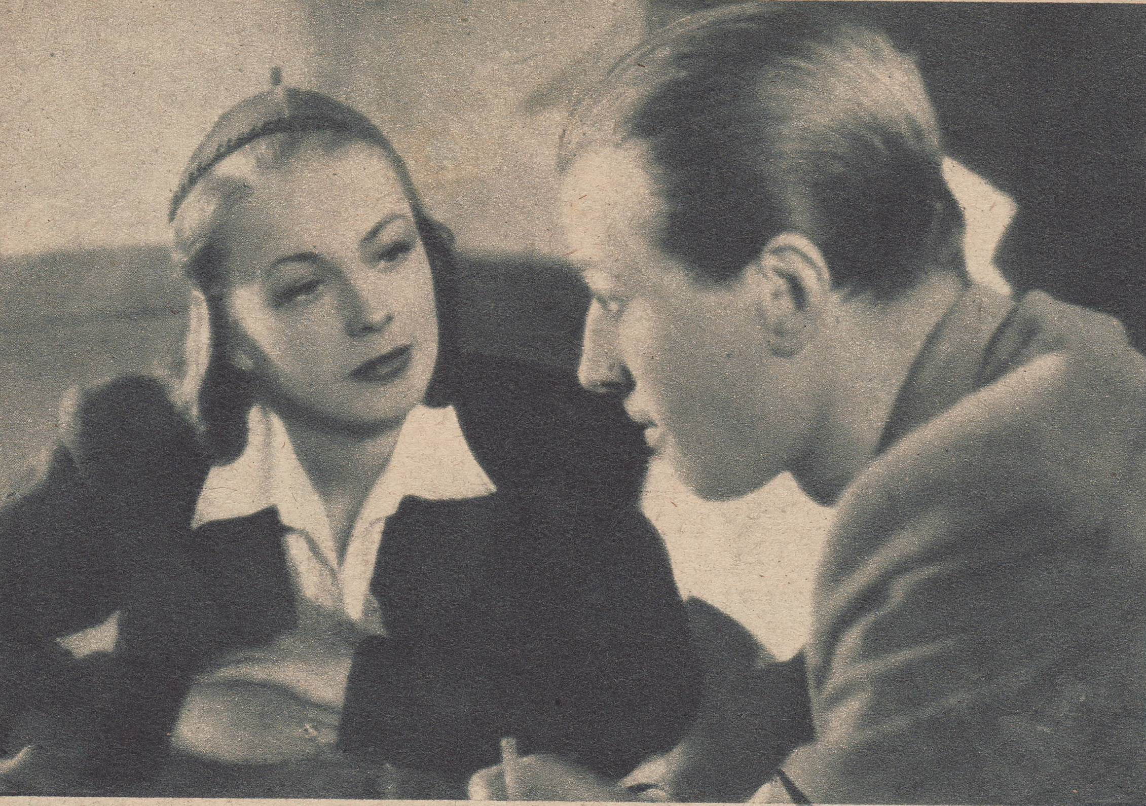 Kadr z filmu fabularnego Zakazane Piosenki nakręconego w 1946 roku.